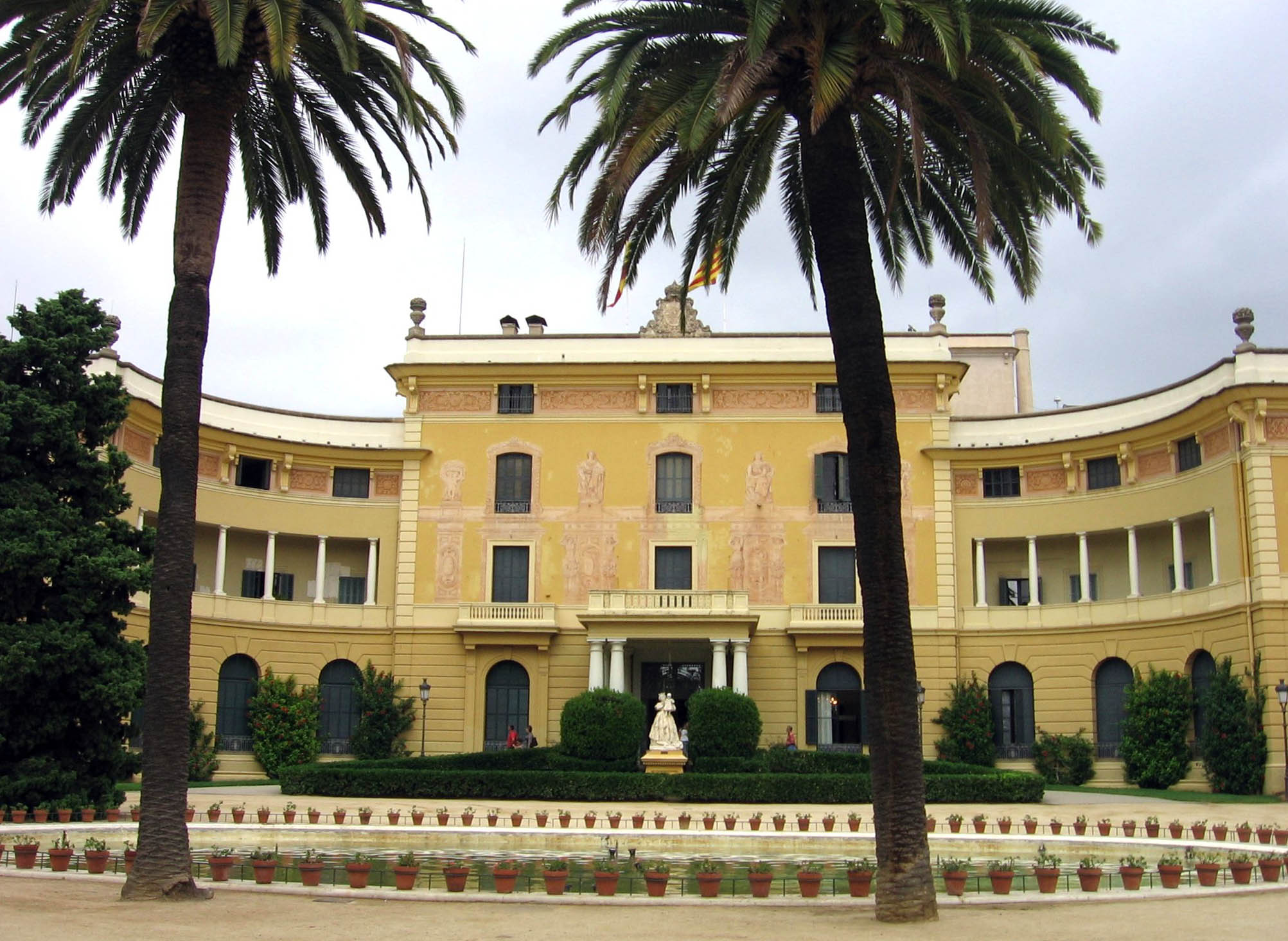 Palacio Real de Pedralbes.